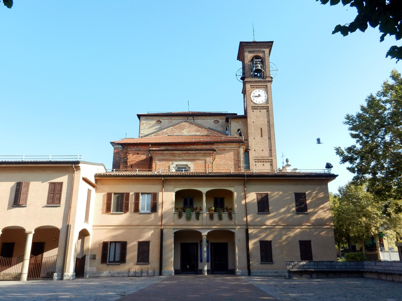 Pessano con Bornago - Chiesa Parrocchiale dei Ss. Vitale e Valeria